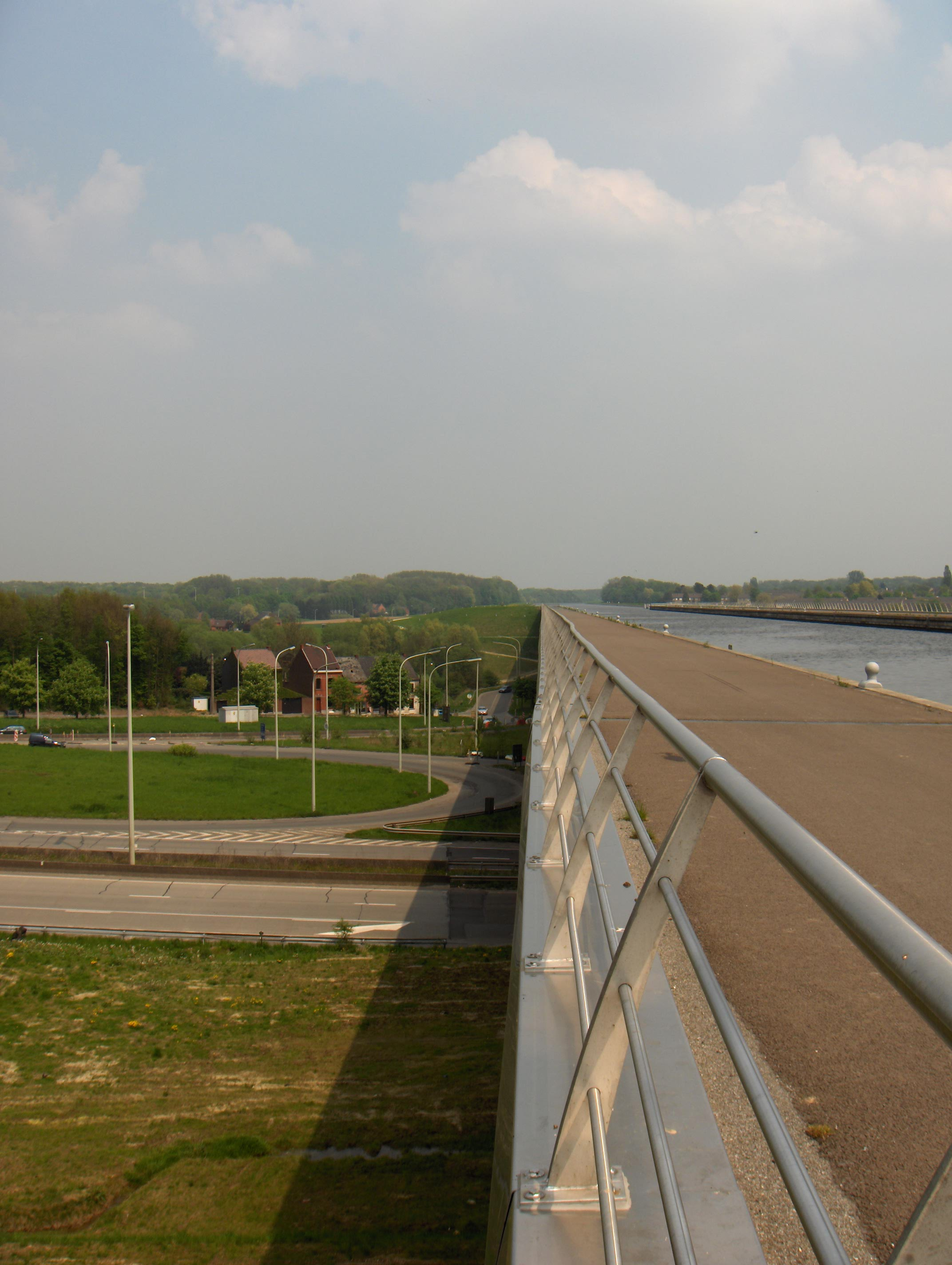 Kanalbrücke am Canal du Centre (La Louvière, Ortsteil Houdeng-Aimeries, Prov. Hennegau, Belgien); Brücke über die Straße N55 Le Roeulx-Binche und die Chaussée du Pont du Sart. 1998-2002 errichtet worden. Architekt: Jean-Marie Cremer. Blick von Westen.